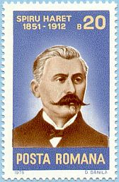 Source: Post of Romania